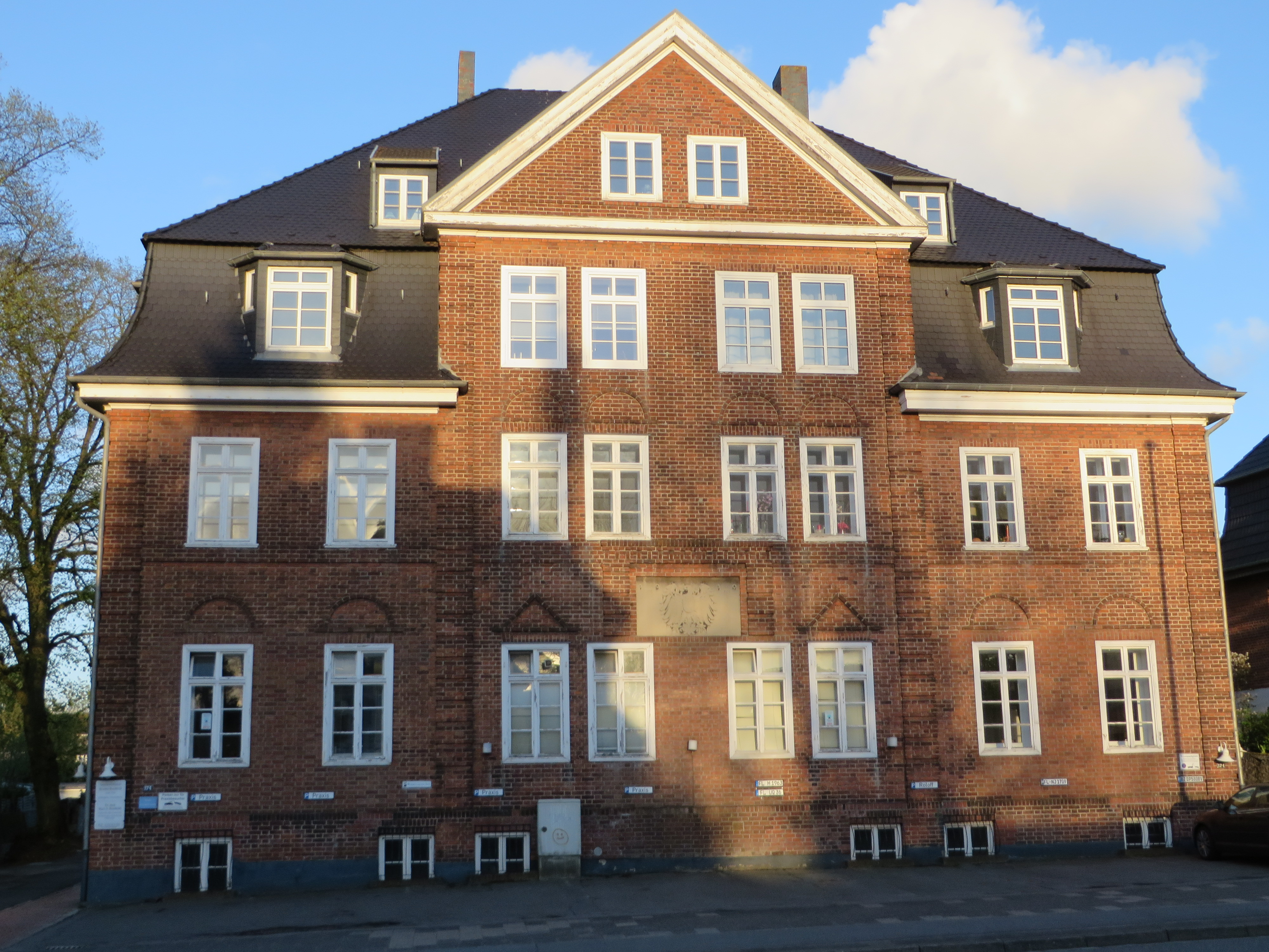 Kaiserliche Post Flensburg-Mürwik, von vorne (Mai 2015), Bild 03